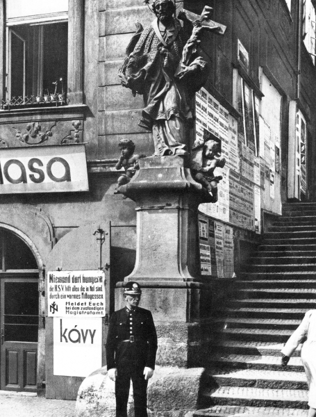 Podle německé propagandy příslušníci Protektorátu hladověli a tak byly zřízeny nacistické organizace "sociální pomoci," které rozdávaly "hladovějícím Čechům" jídlo. Akce skončila fiaskem a tak pojízdné kuchyně byly staženy zpět do Německa a výdejny jídla byly zrušeny. Na fotografii stojí český četník před jednou takovou výdejnou jídla.